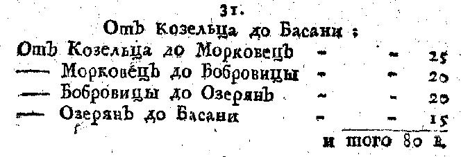 Василій Рубанъ. Любопытный мѣсяцесловъ на 1775 годъ. — СПб, 1775. — С. 87.